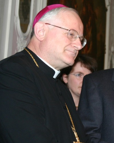 Mons. Giuseppe Zenti, vescovo cattolico italiano.